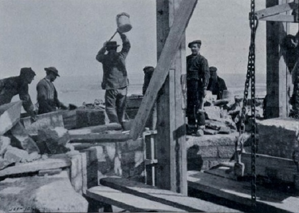 La construction du phare de l'Île Vierge (photo prise en 1899 à 45 mètres de hauteur)